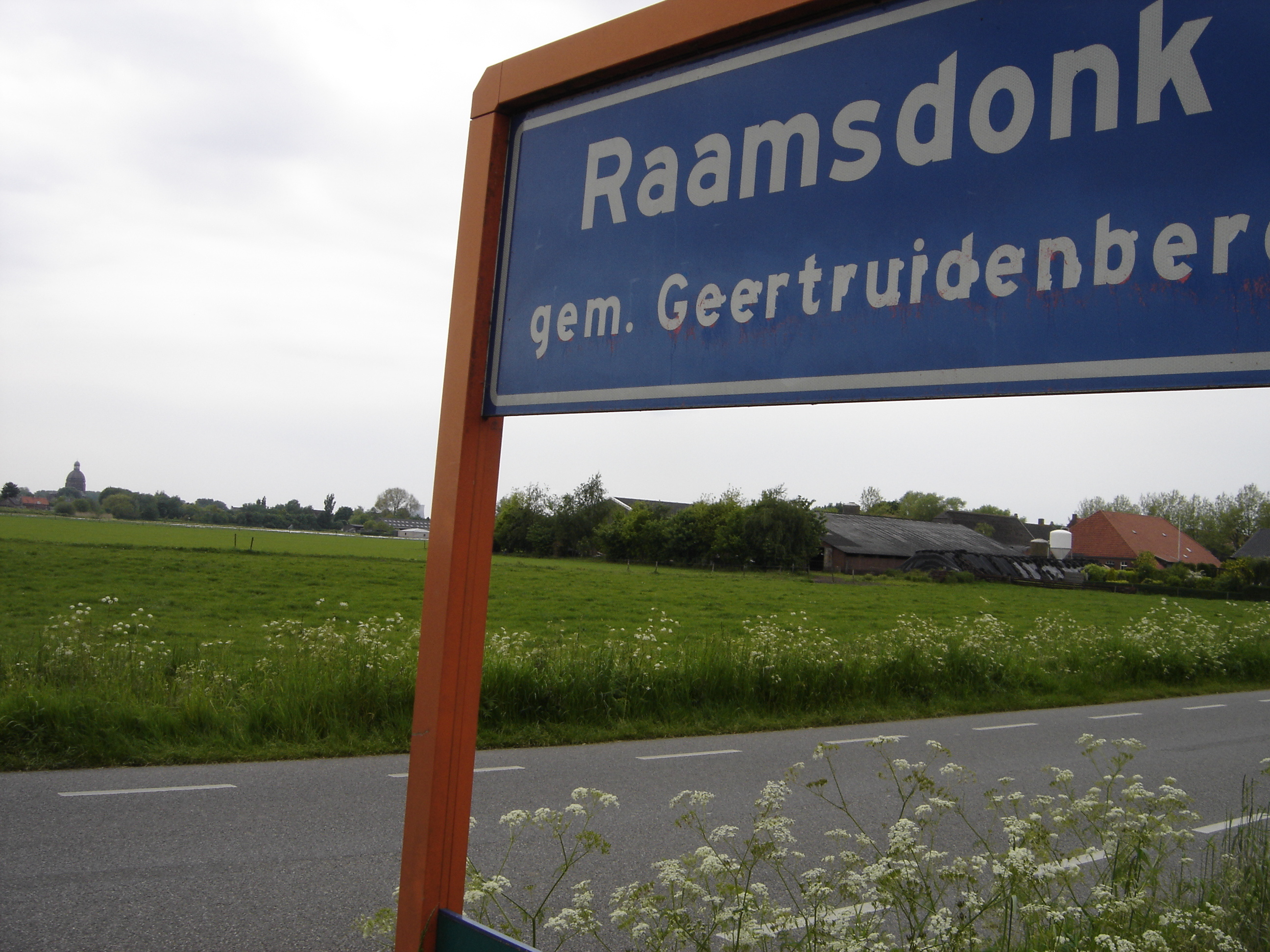 Raamsdonk plaatsnaambord. Eigen foto door Sjors van der Giessen.